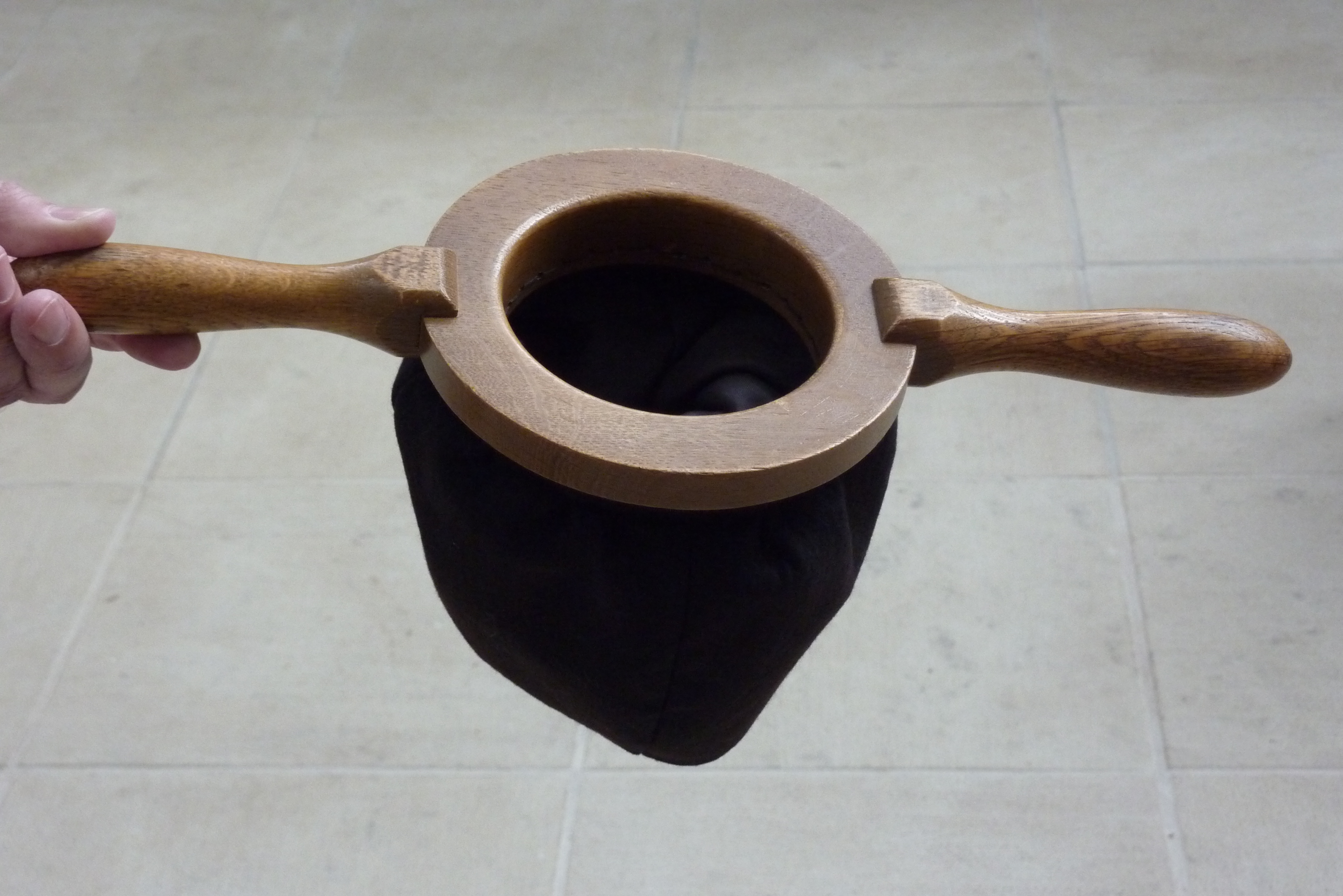 Evangelische Kirche in Mühlbach (Eppingen), Klingelbeutel